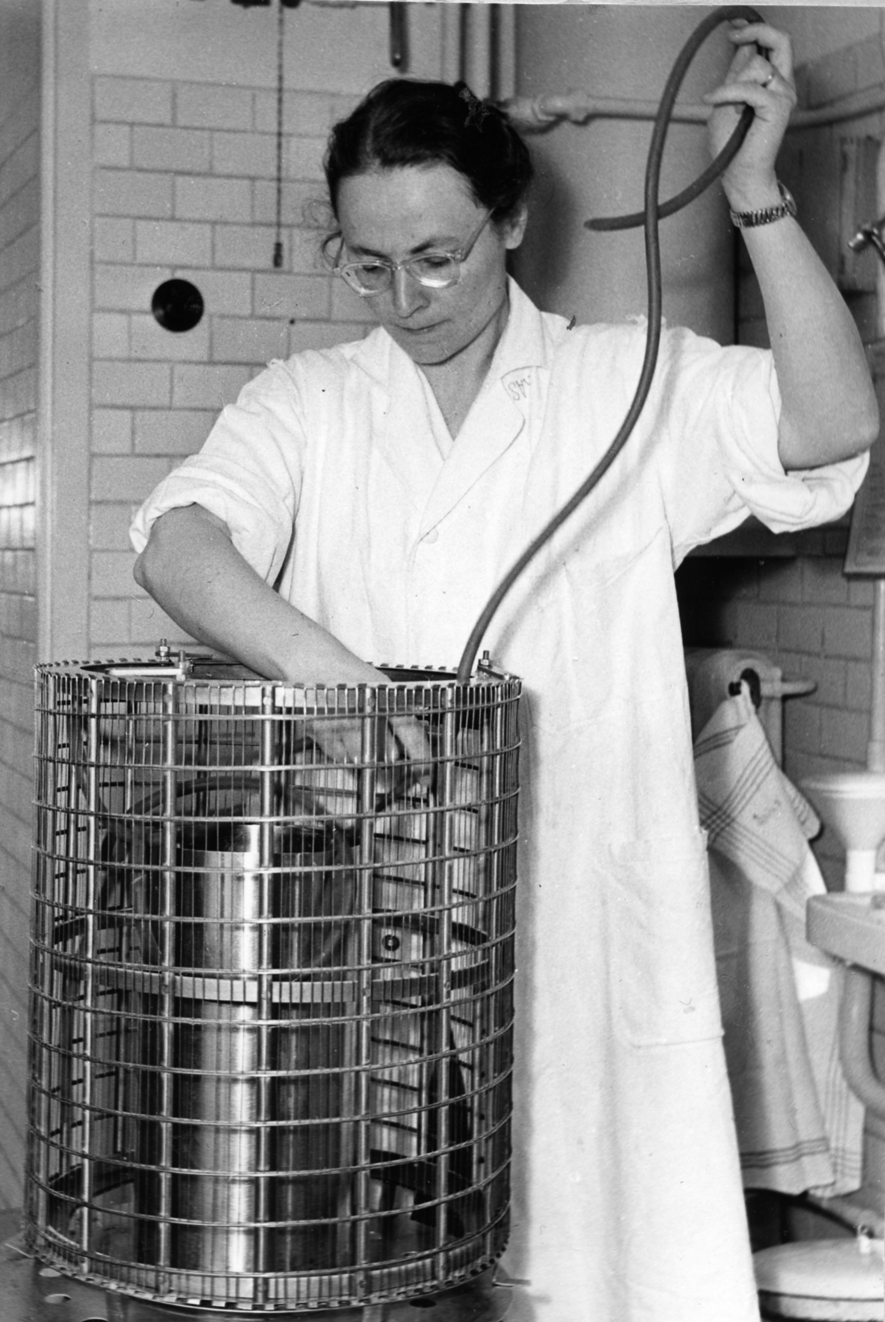 Maria pzrygotowuje sztuczną nerkę do dializy 1950 r.